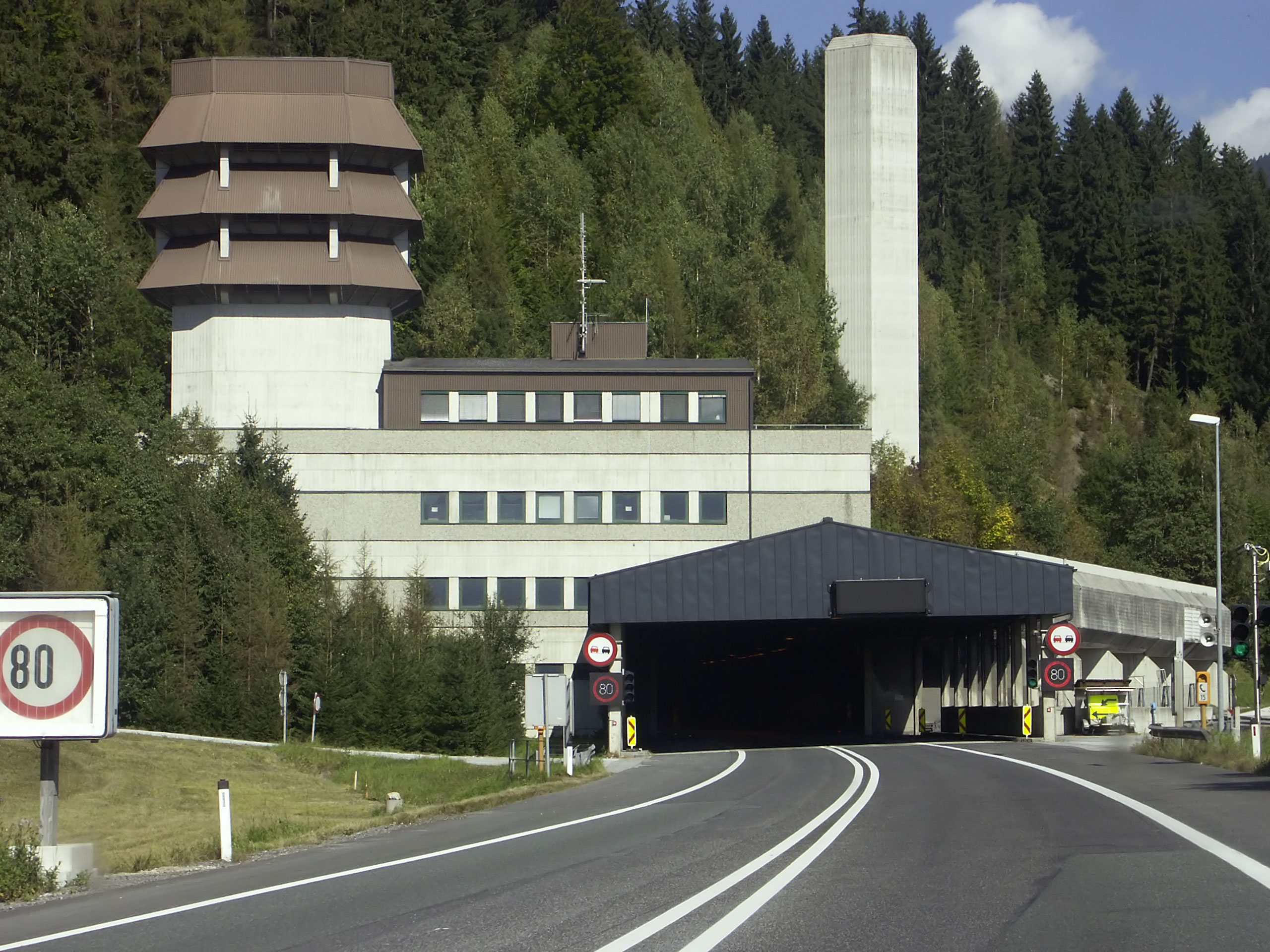 Foto des Südportals des Bosrucktunnels (Straße)